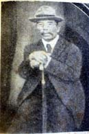 若かりし頃の星名謙一郎